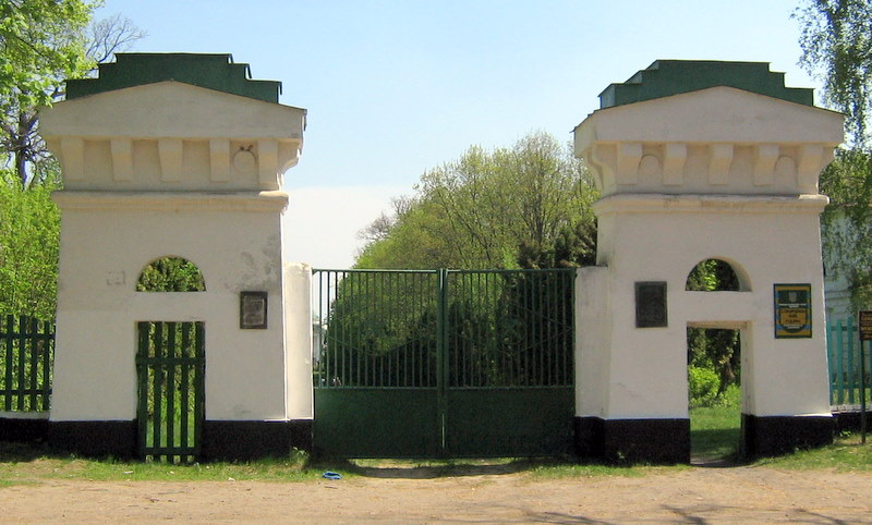 Вхід в Сокиринський парк